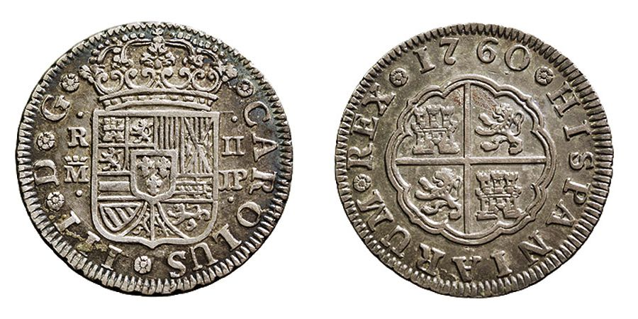 Moneda de dos rals encunyada en Madrid el 1760. Feta en plata.